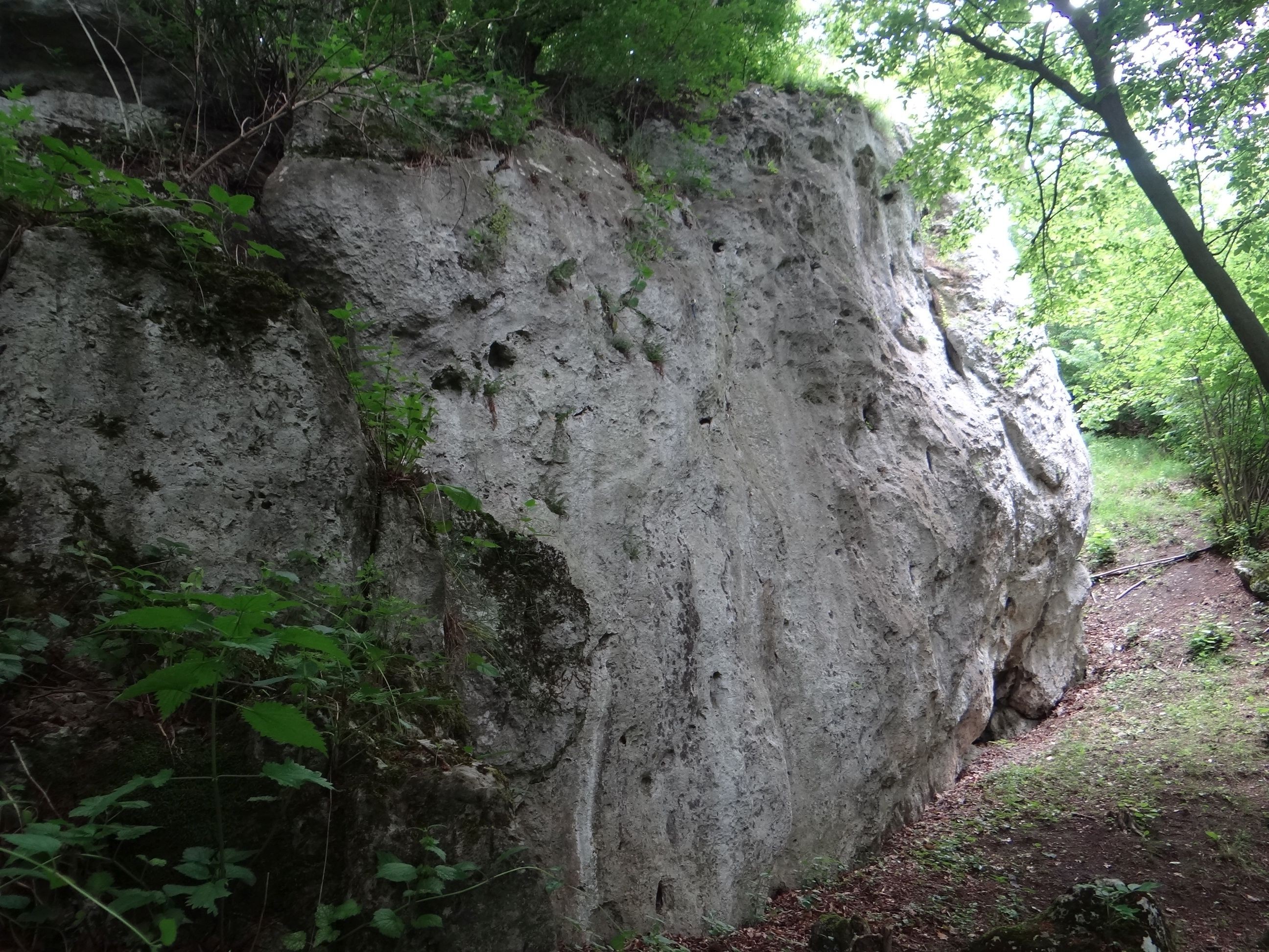 Mały Chiński Mur w Dolinie Dłubni w Imbramowicach